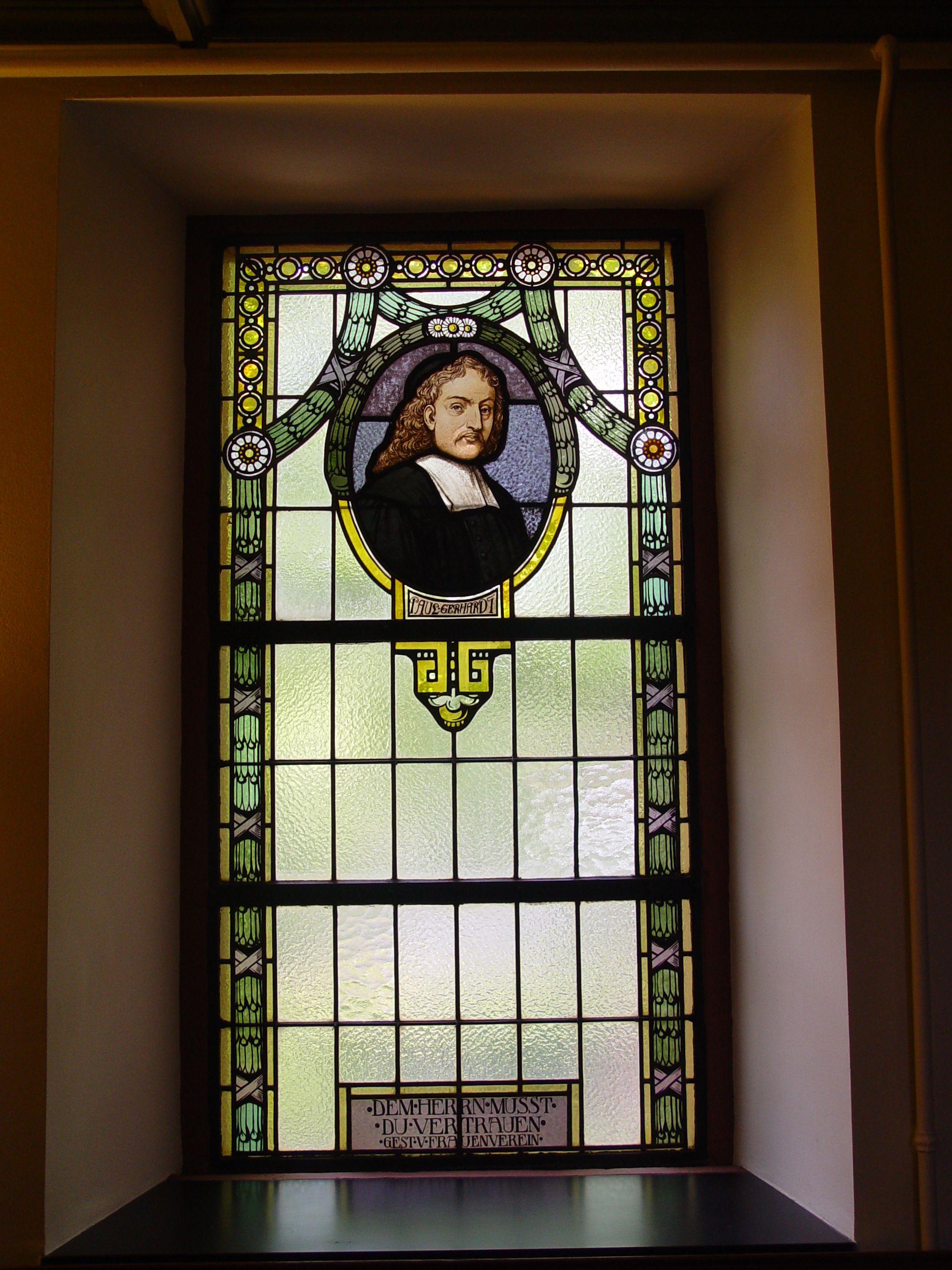 Glasmalerei